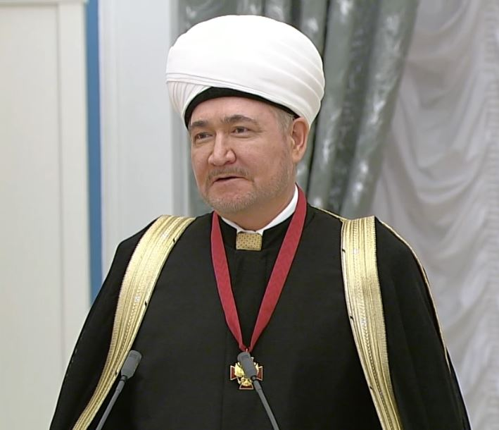 Председатель Совета муфтиев России Равиль Гайнутдинов на церемонии вручения Государственных наград и званий в Кремле 21 мая 2015 года.